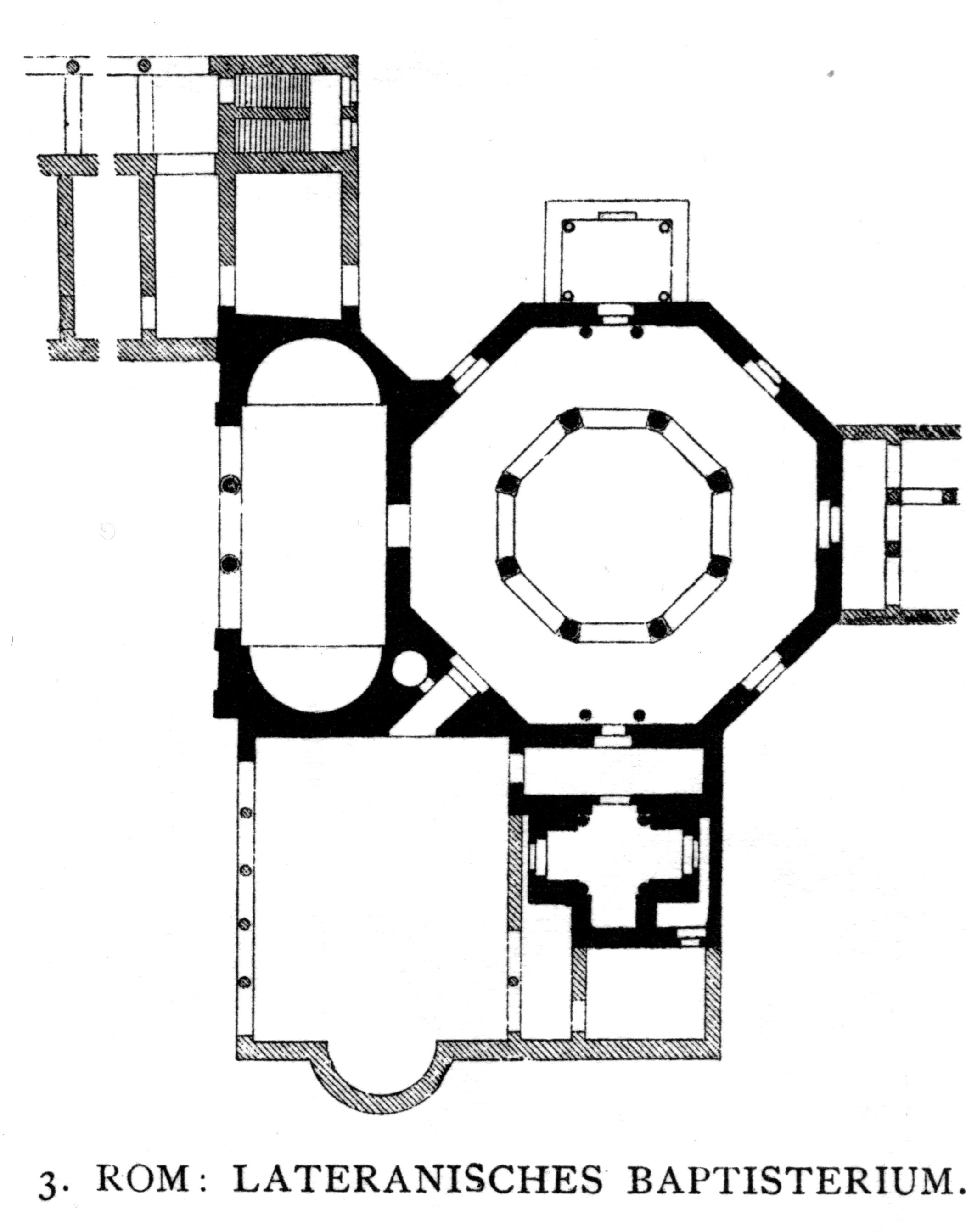 Rome, Lateran, Baptisterio. Floor plan.